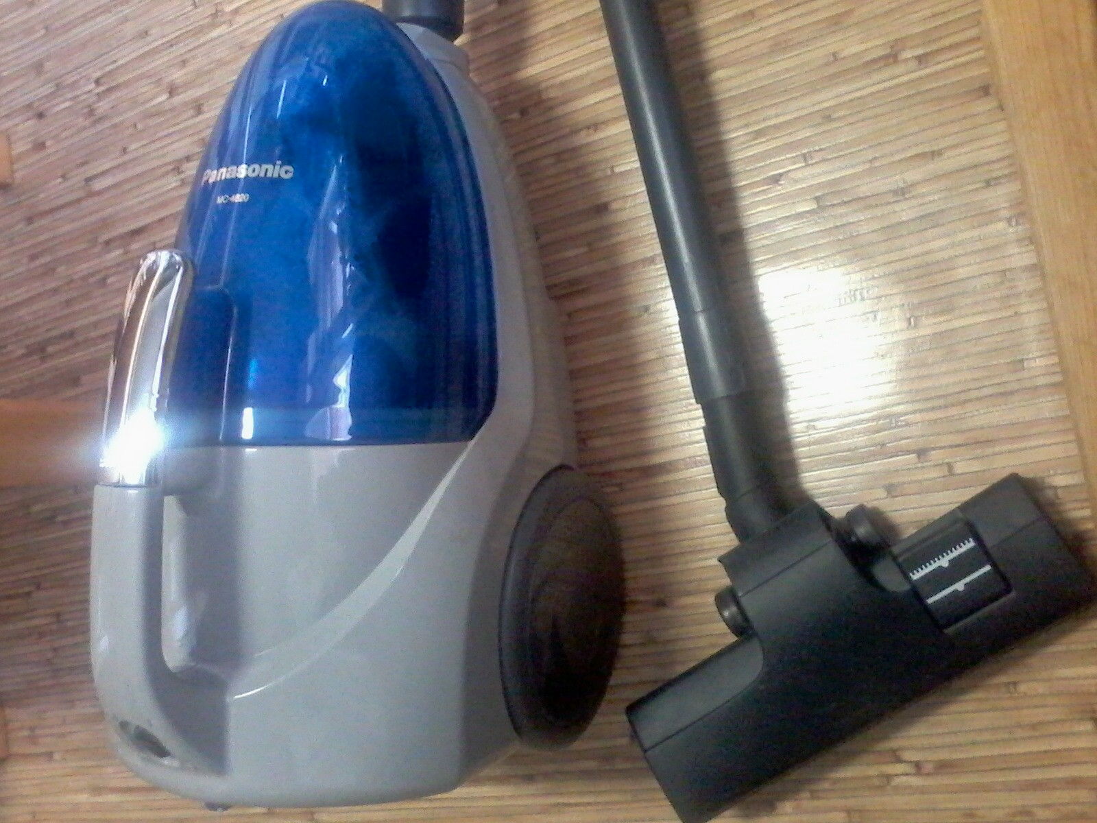 Знято мобілкою Самсунг